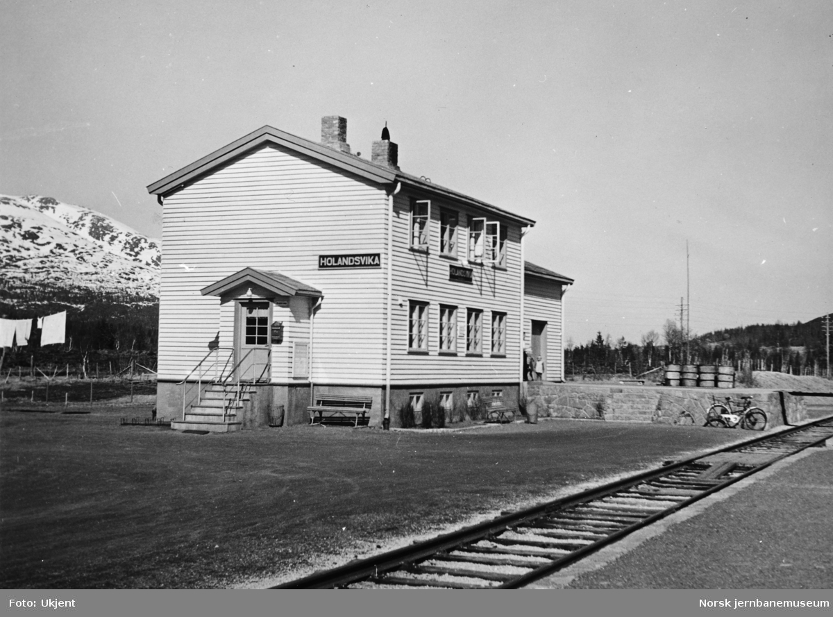 Bildet er hentet fra Norsk jernbanemuseums sider på internett. Foto ukjent.